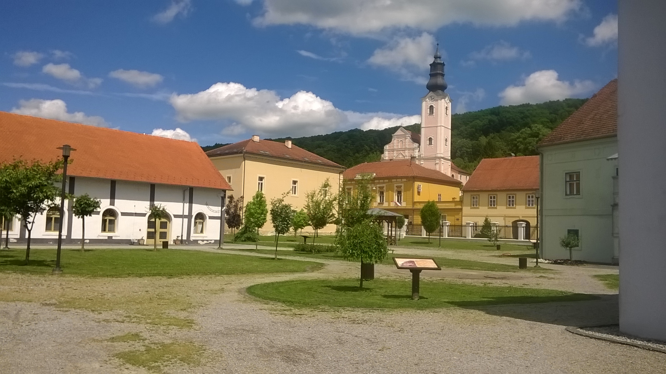 Pakrac, Gutshof